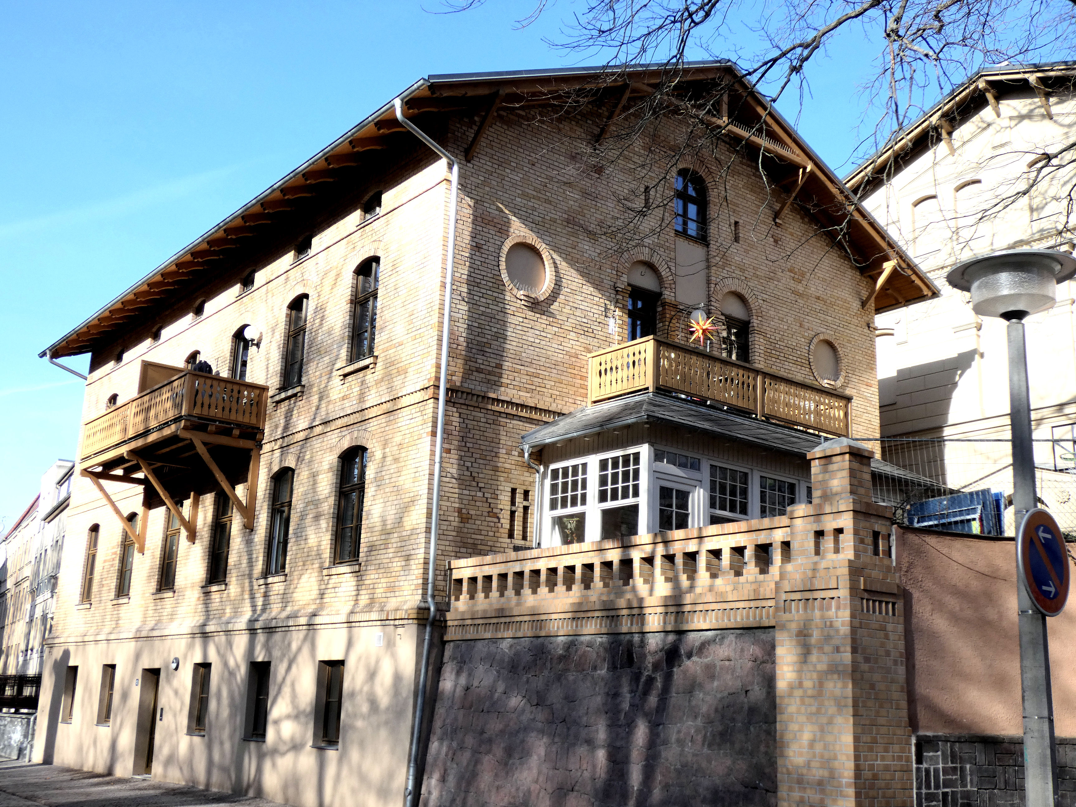 Solbad Wittekind, Logierhaus Villa Margarete, erb. 1876, Wittekindstraße, Halle (Saale)